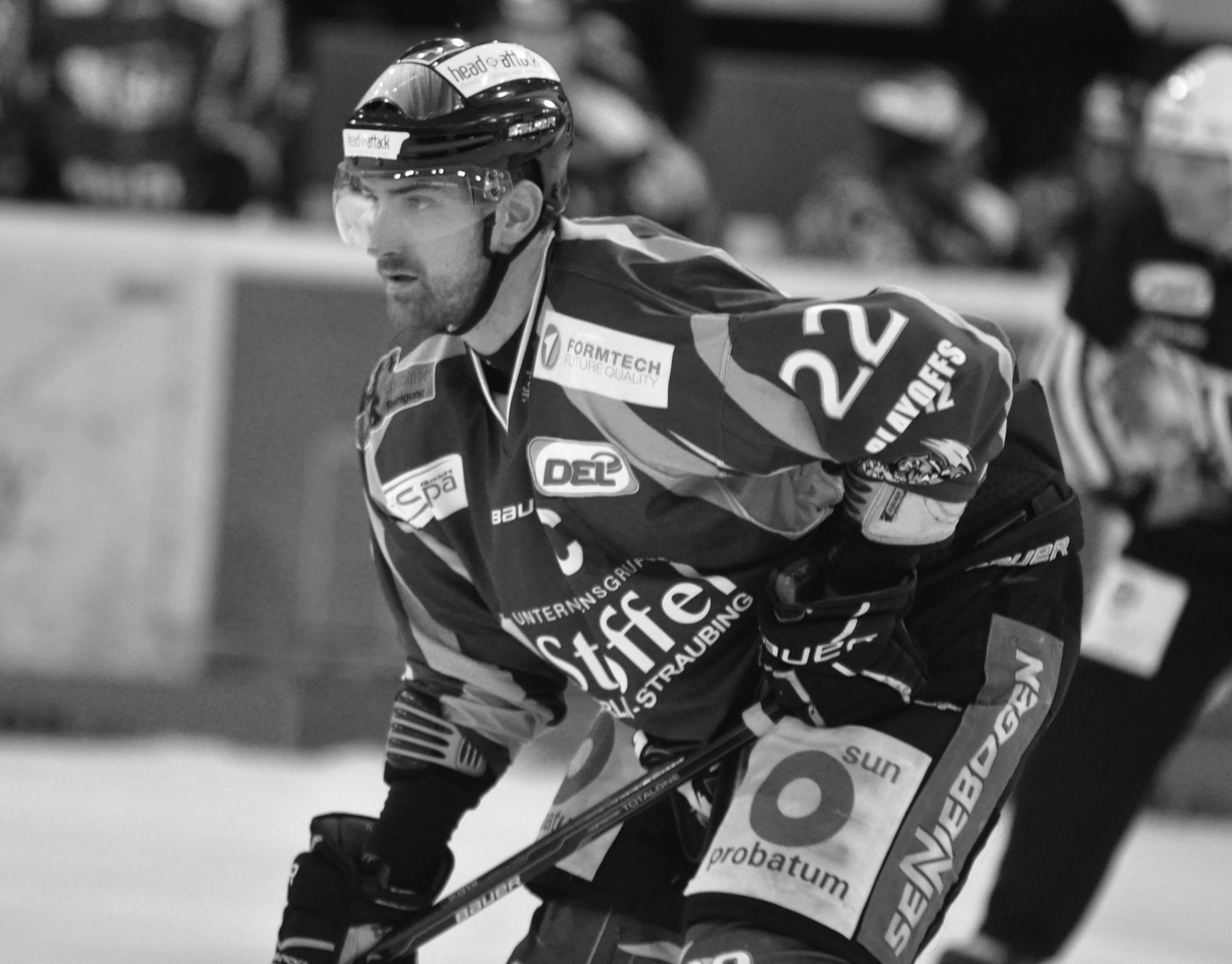 Straubing Tigers - Eisbären Berlin 07.04.2012 DEL PlayOff Halbfinale